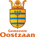 Gemeentewapen van de gemeente Oostzaan